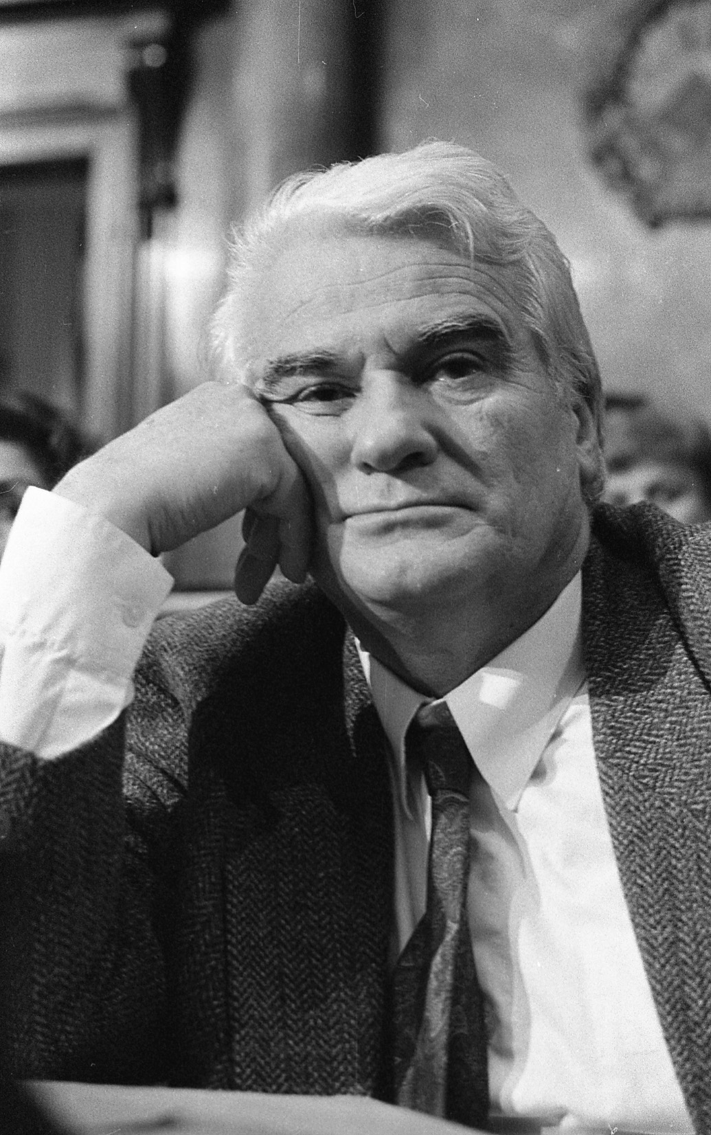 Dragoljub Mićunović, srpski političar.foto: Stevan Kragujević (po odobrenju kćerke Tanje Kragujević)